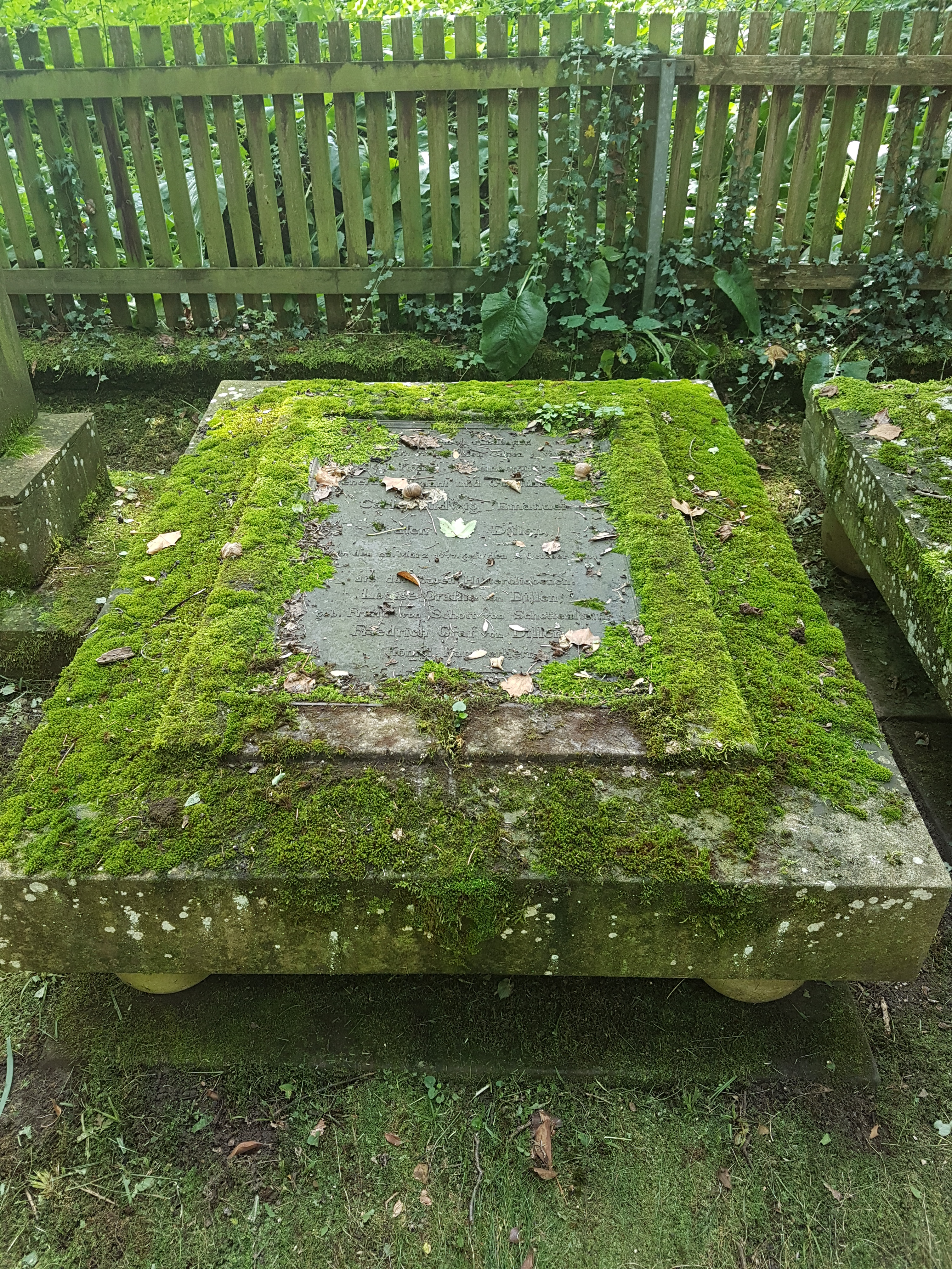 Grabmal von Carl Ludwig Emanuel von Dillen auf dem Adelsfriedhof in Dätzingen